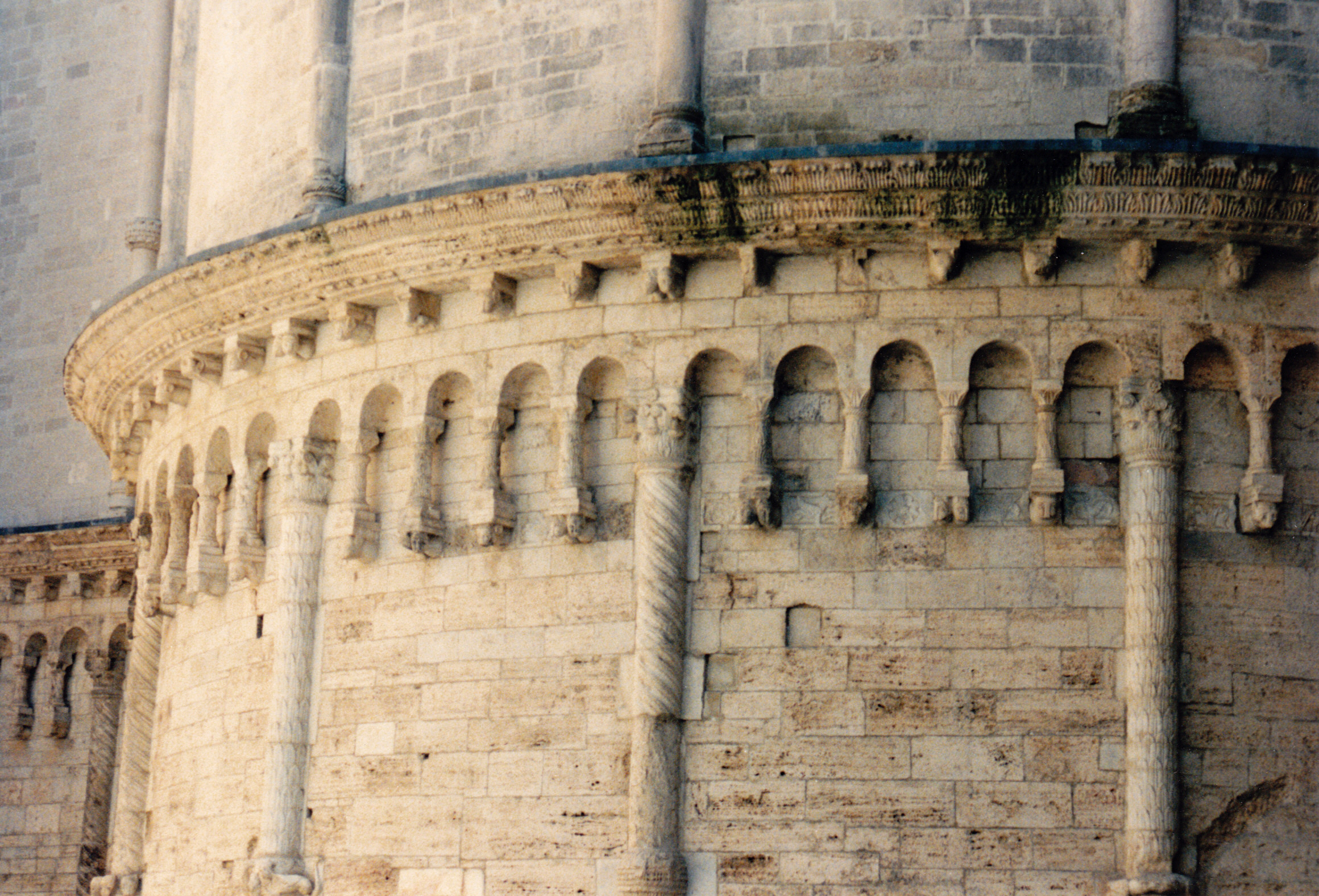 Italie - Ombrie - Cathédrale de Todi